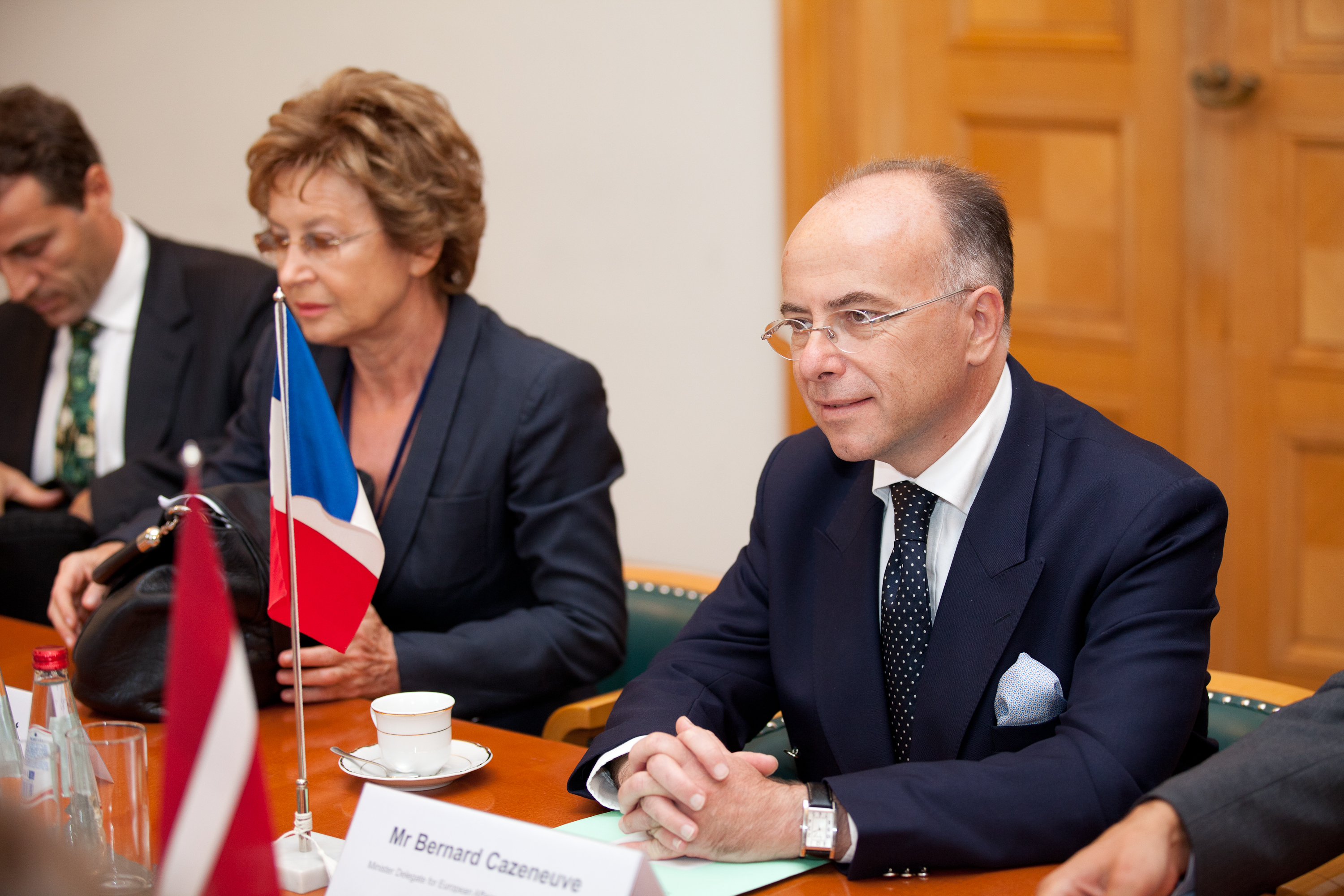 Foto: Toms Norde, Valsts kanceleja